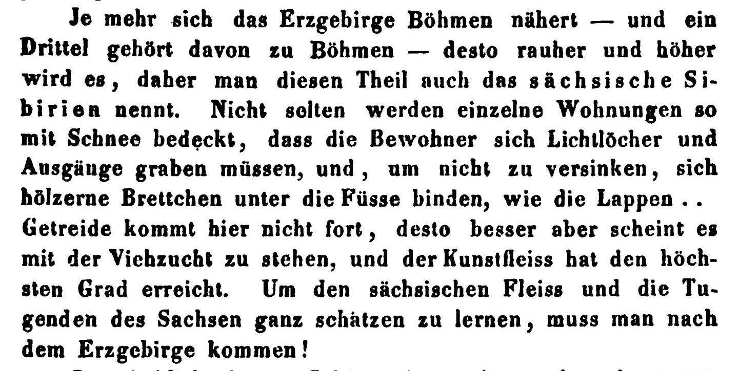 Sächsisches Sibirien Carl Julius Weber beschreibt auf Seite 281 seines Buches Deutschland oder Briefe eines in Deutschland reisenden Deutschen das obere westliche Erzgebirge als das sächsische Sibirien. Carl Julius Weber: Deutschland oder Briefe eines in Deutschland reisenden Deutschen. 3. Auflage. 3. Band. HallbergerscheVerlagshandlung. Stuttgart 1855, Seite 281 Digitalisat, abgerufen am 27. Juli 2014